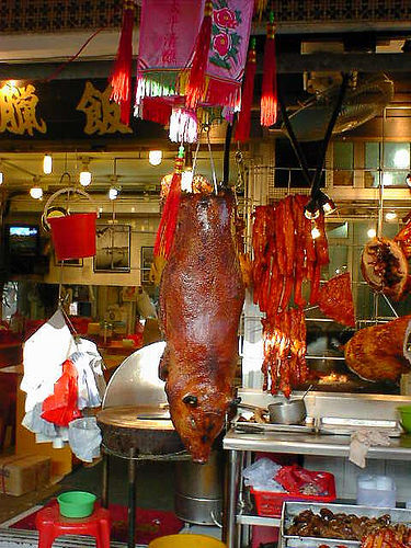 Cantonese cuisine. Lou mei category display.